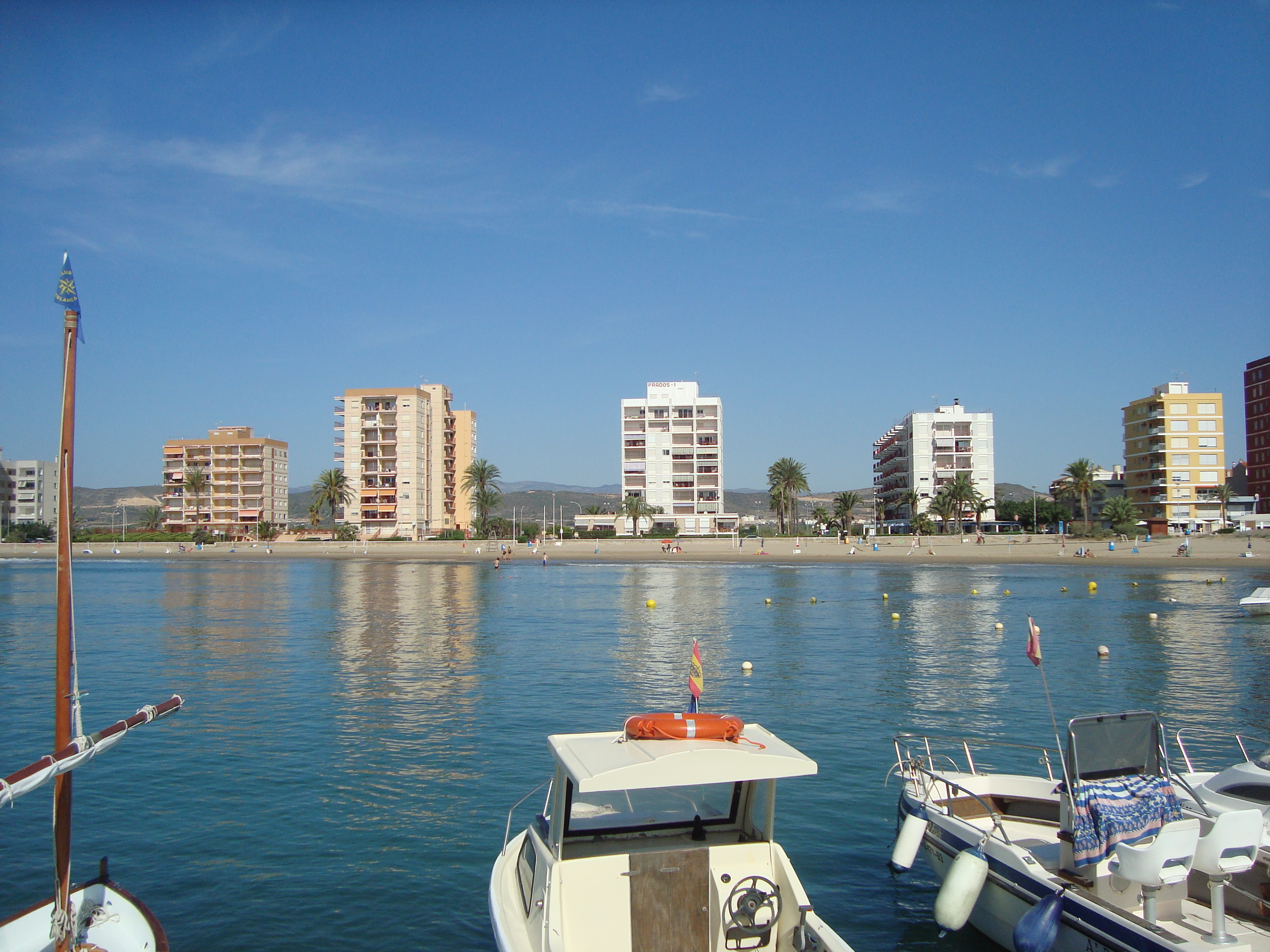 Prados, Platges de Torreblanca, platja de Torrenostra, Castelló